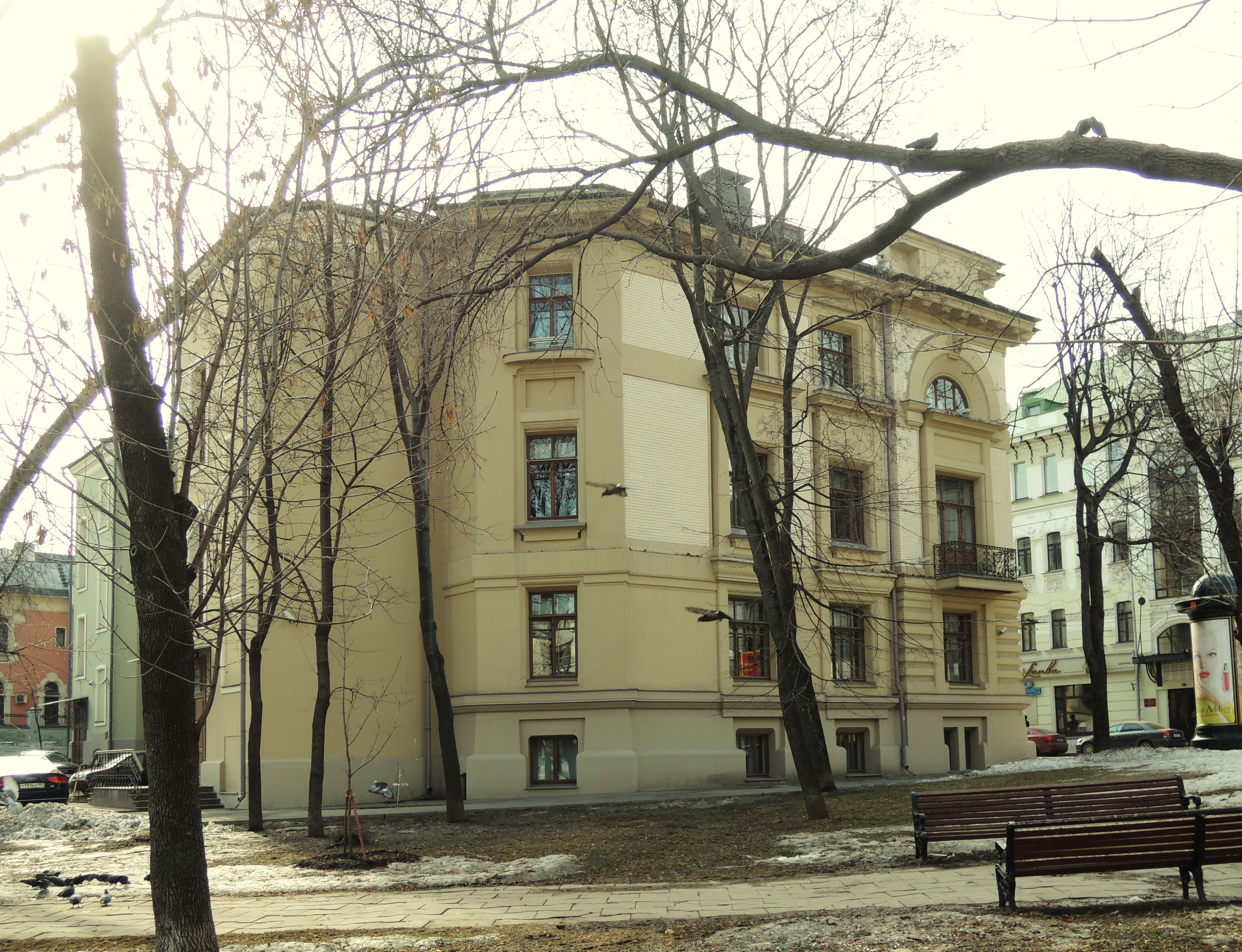 ул. Остоженка